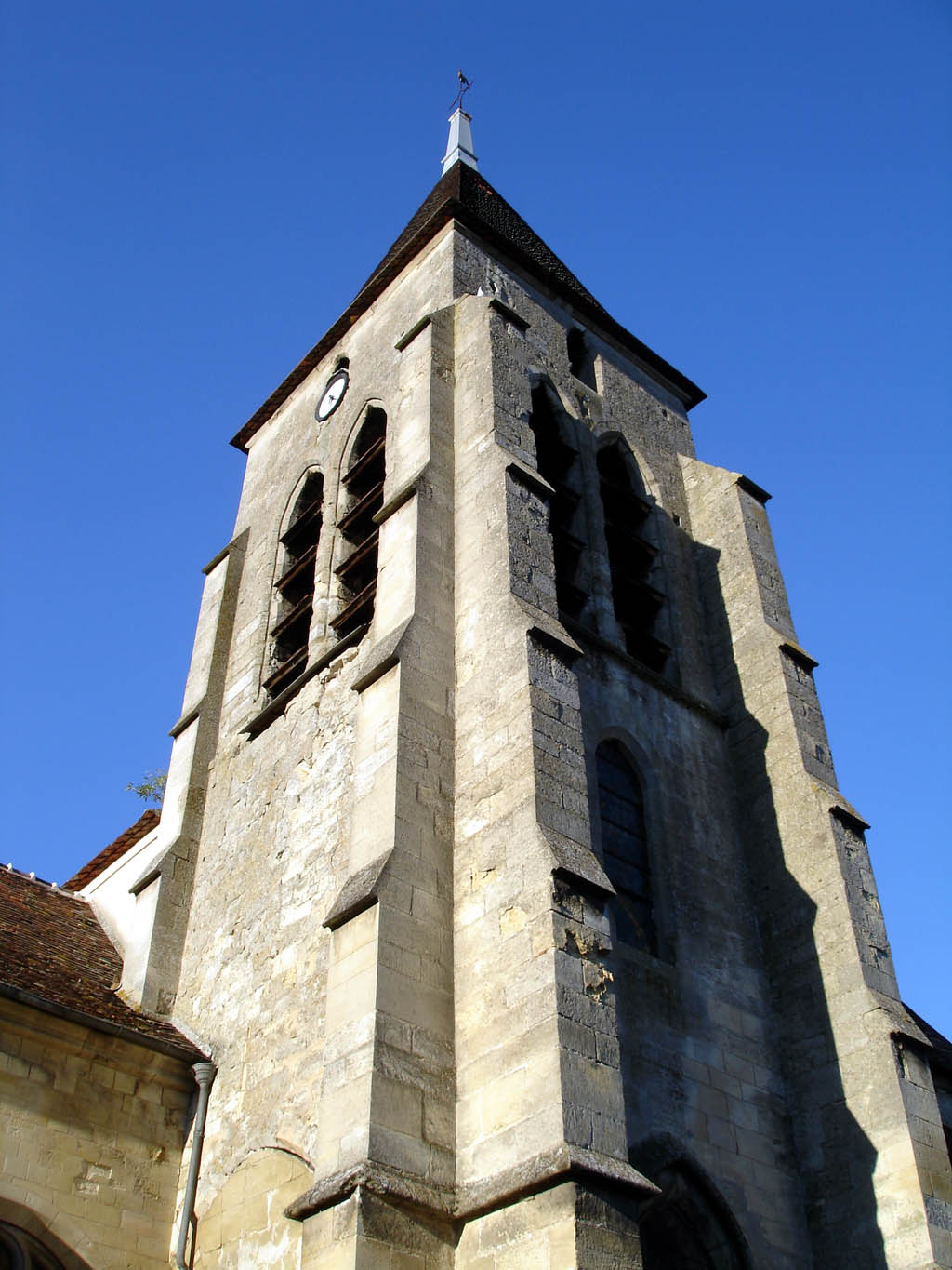 Clocher de l'église Saint-Sulpice de Villiers-Adam (Val-d'Oise), France